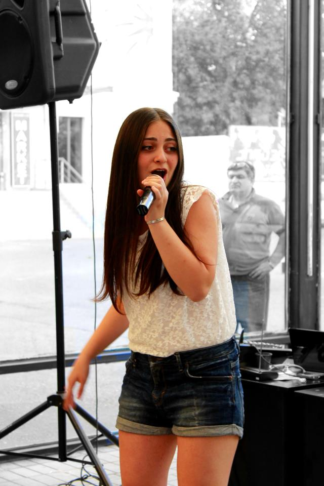 ნიჭიერი ქართველი მომღერალი